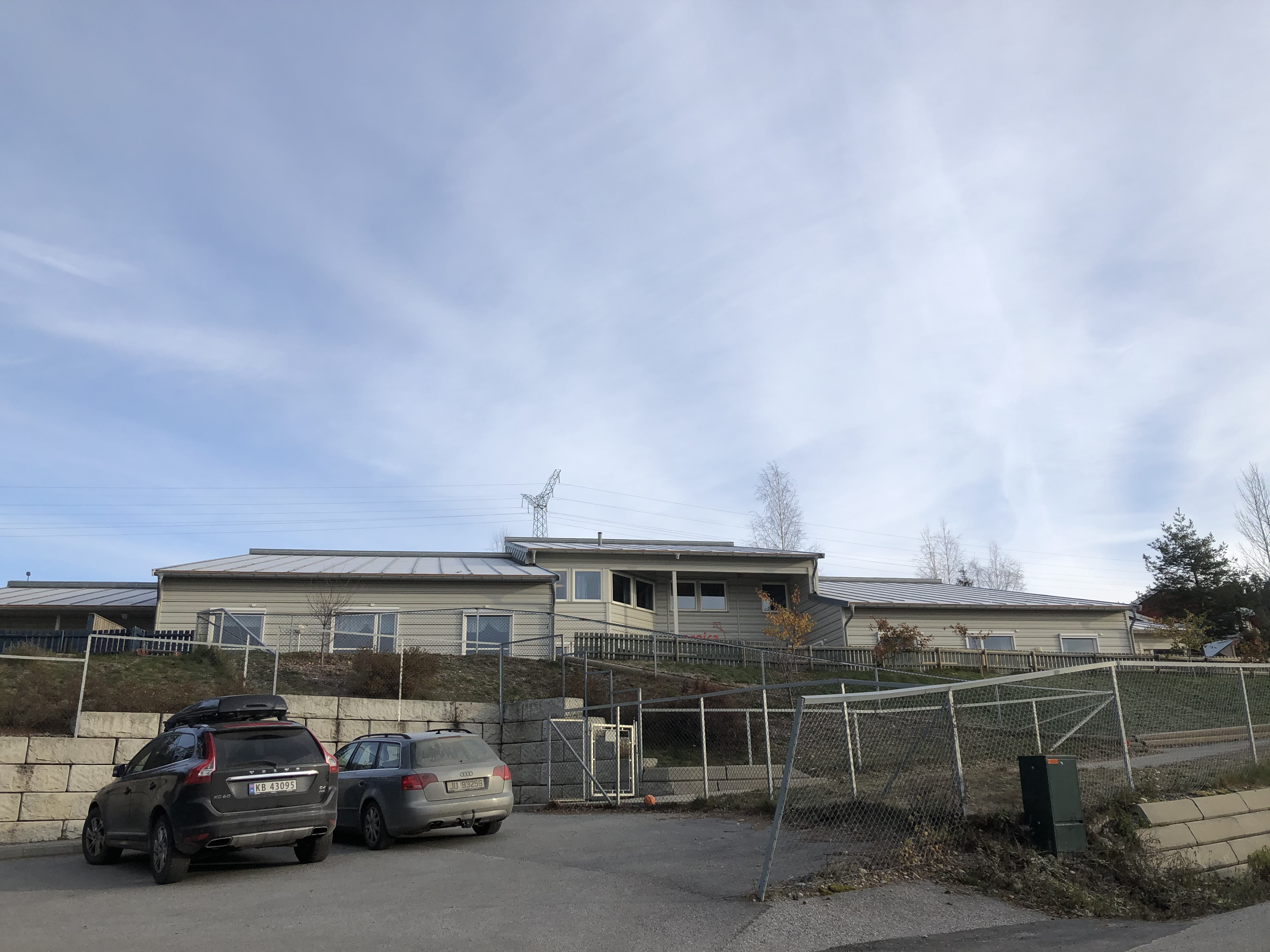 Trygstadveien 16 (Espira Trygstad Barnehage), Hønefoss